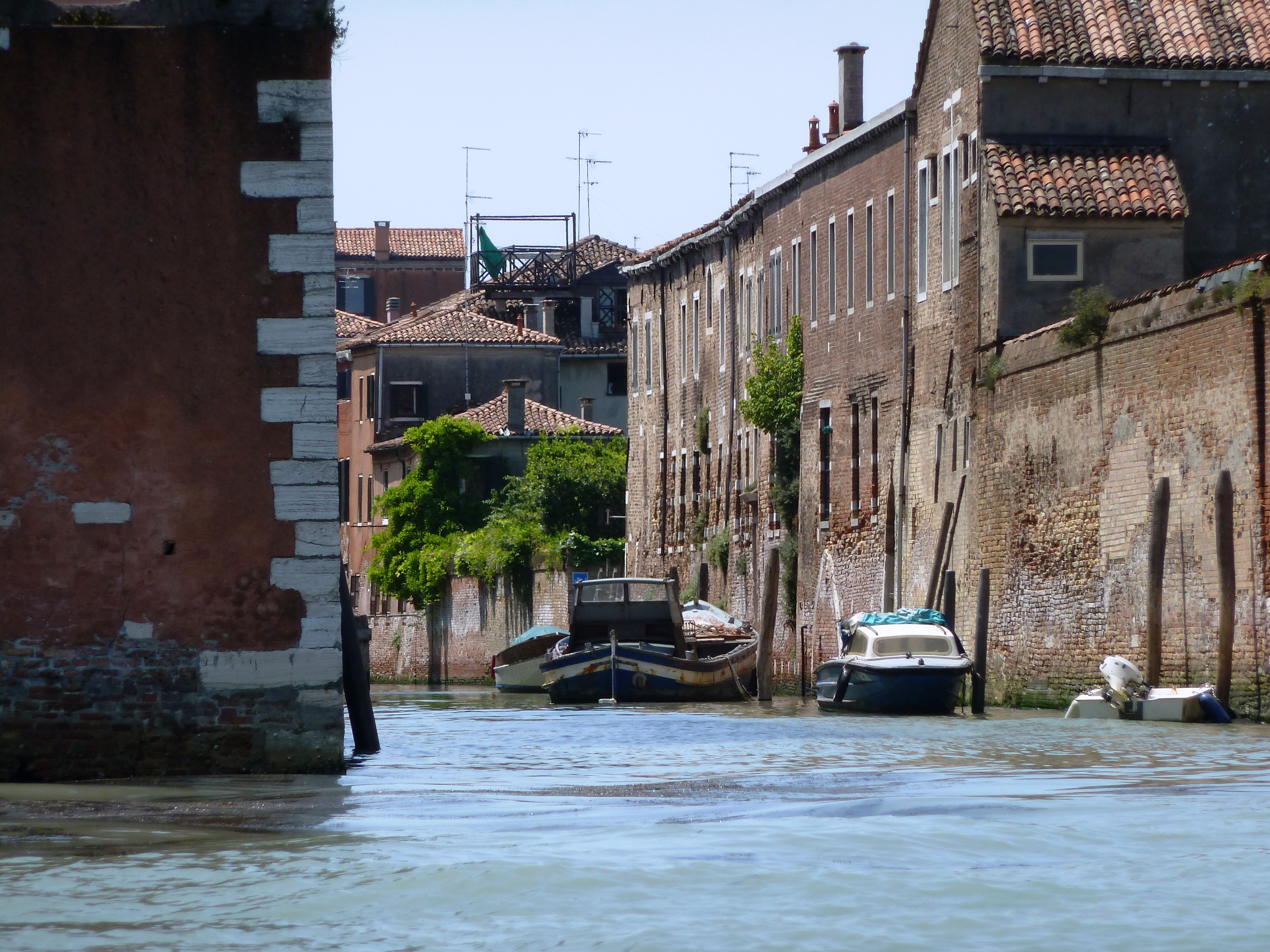 Rio degli Zecchini (Venice)